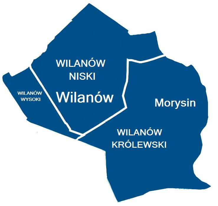 Wilanów Właściwy i Morysin wg. MSI